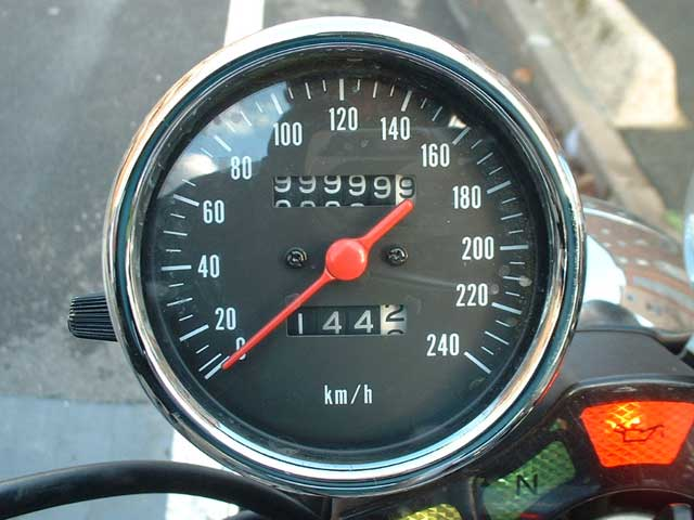 Passage du compteur à 100.000km sur la Bandit 600